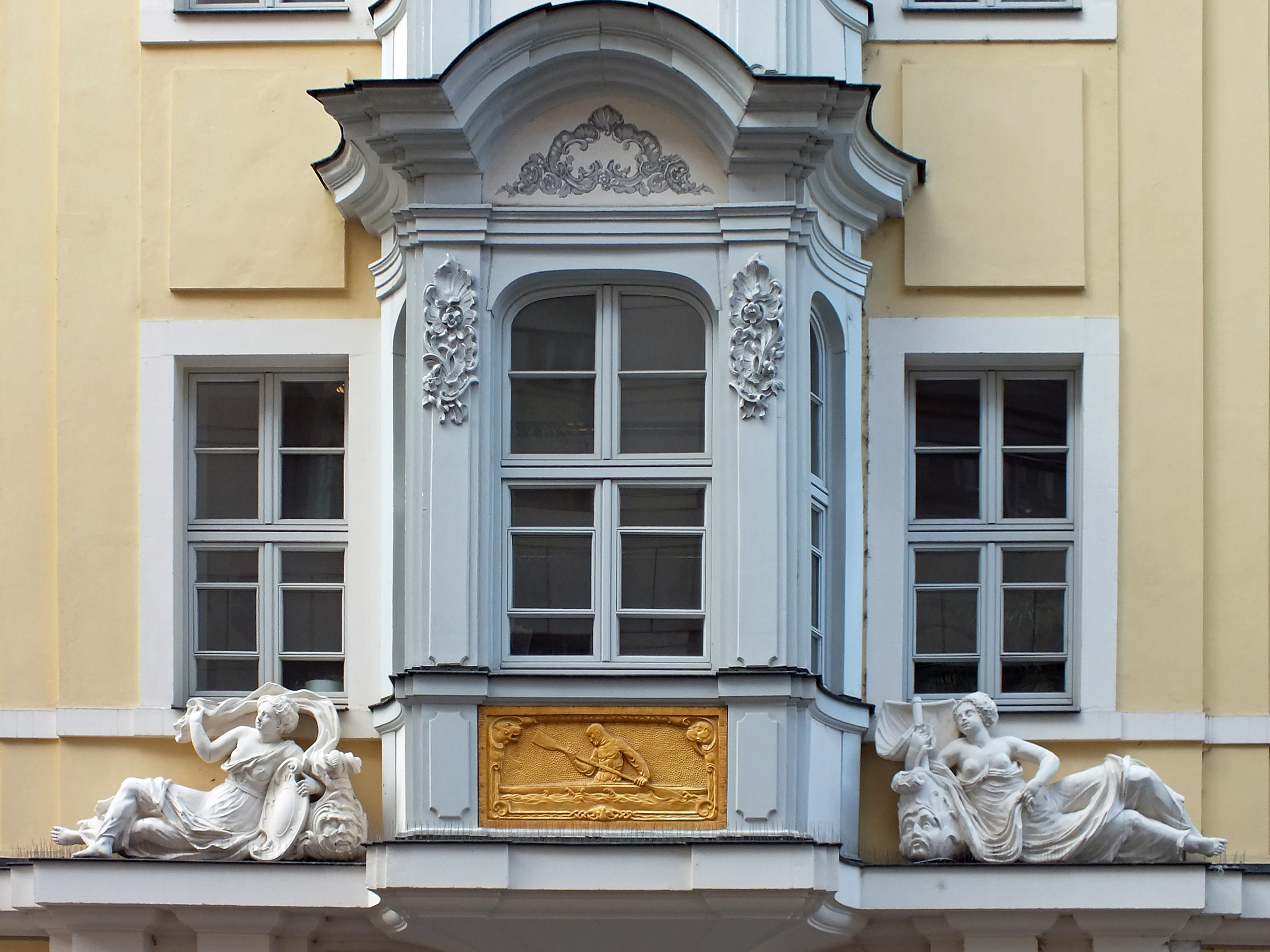 Unterer Teil des Erkers mit dem Hauszeichen des Hauses Zum Grönländer in der Leipziger Petersstraße